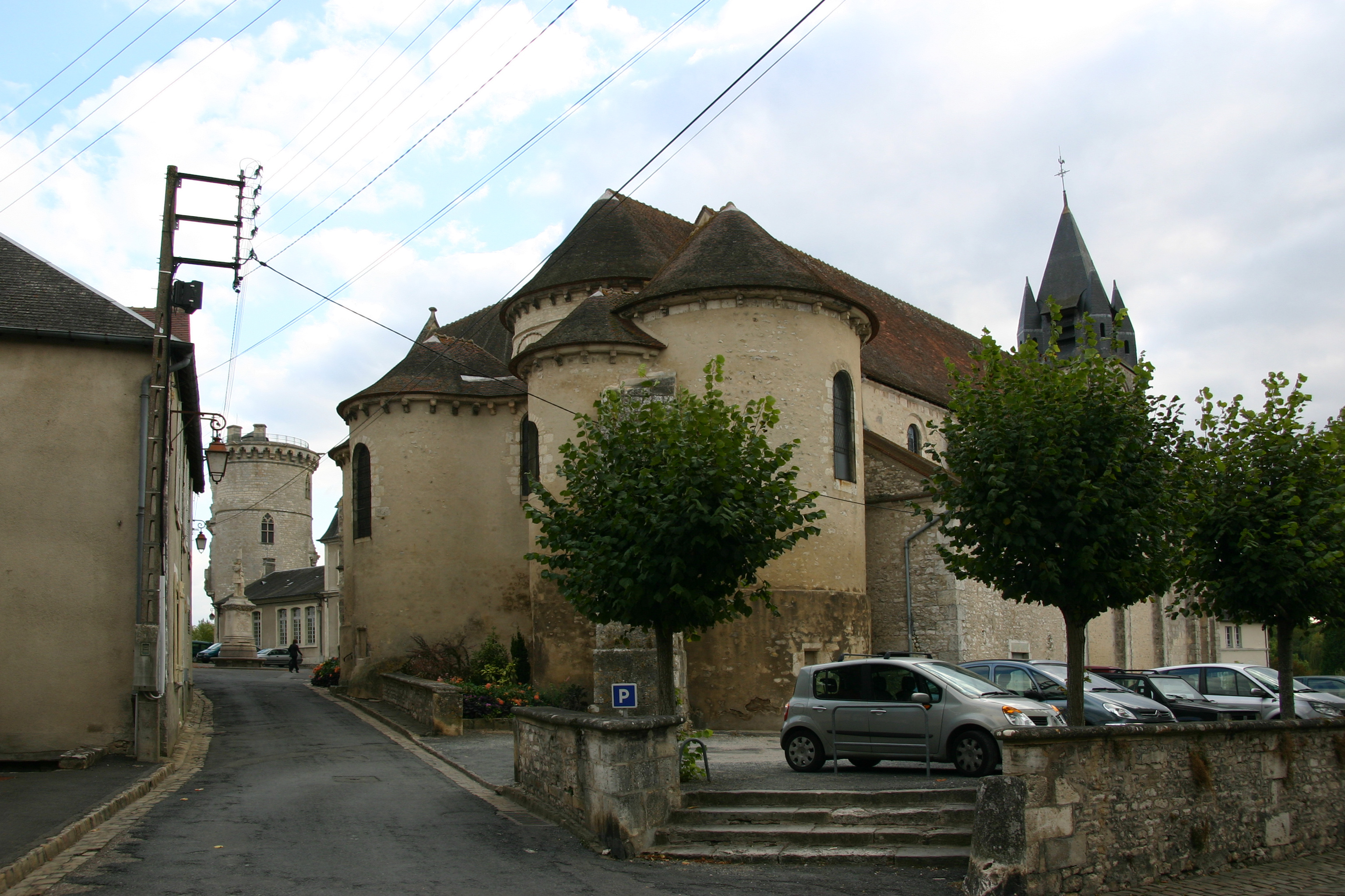 Collégiale Notre-Dame de Mehun-sur-Yèvre